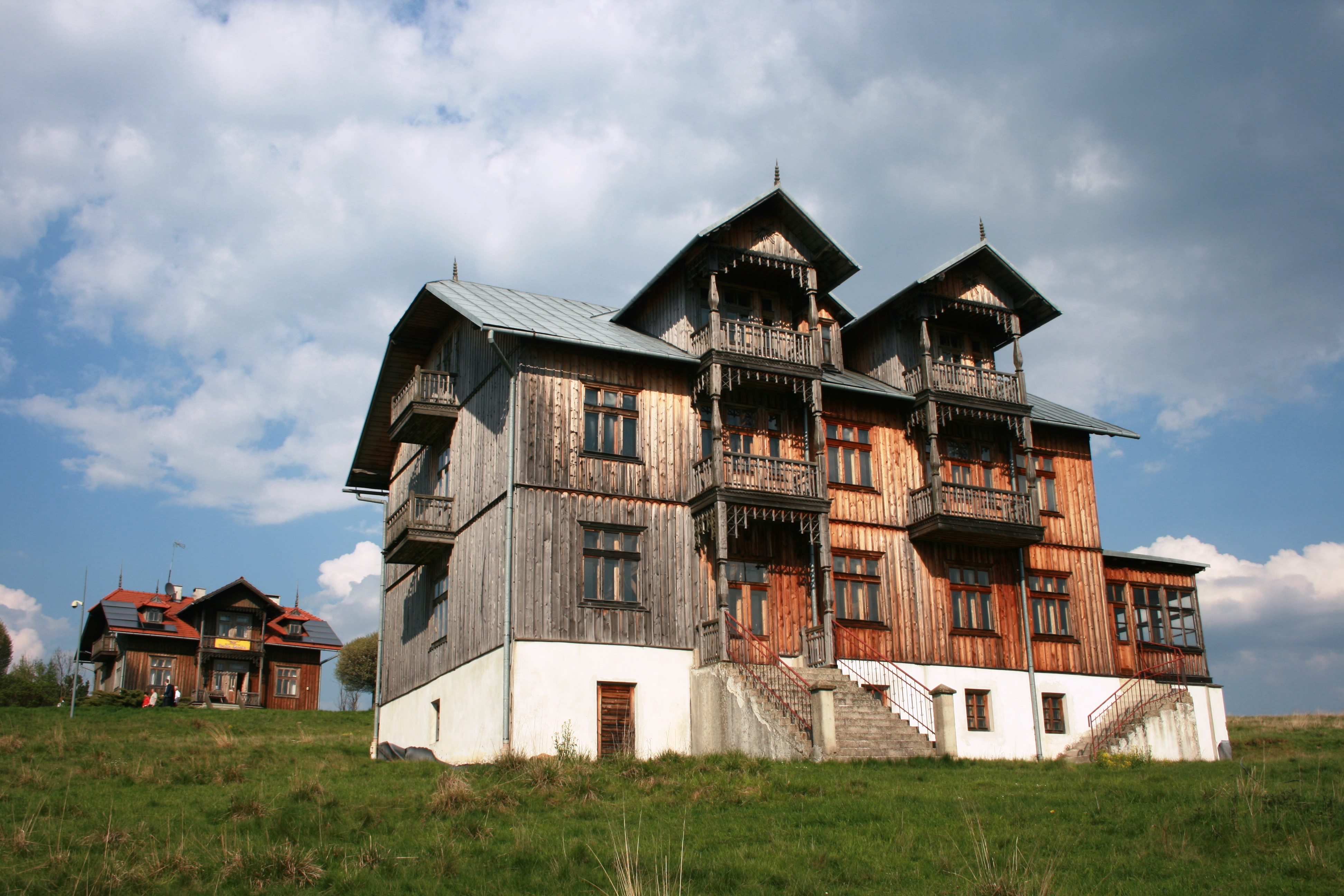 Widok na willę Basia II w Osadzie Czorsztyn od południowego zachodu